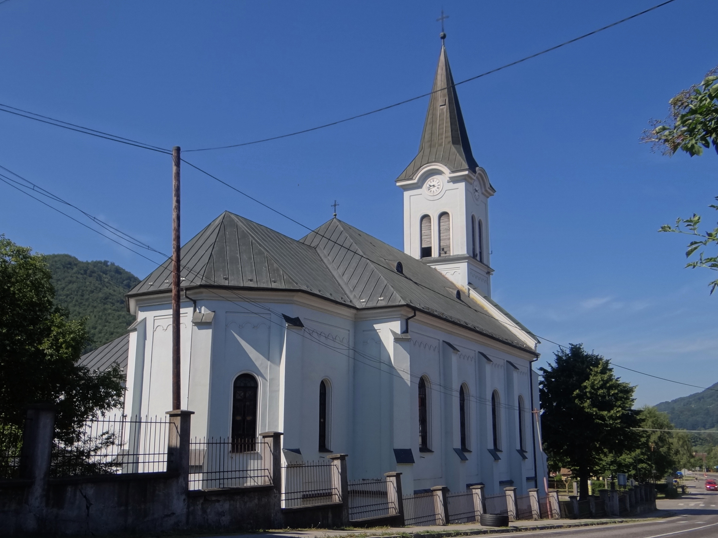 Krivá (Slovensko), kostol